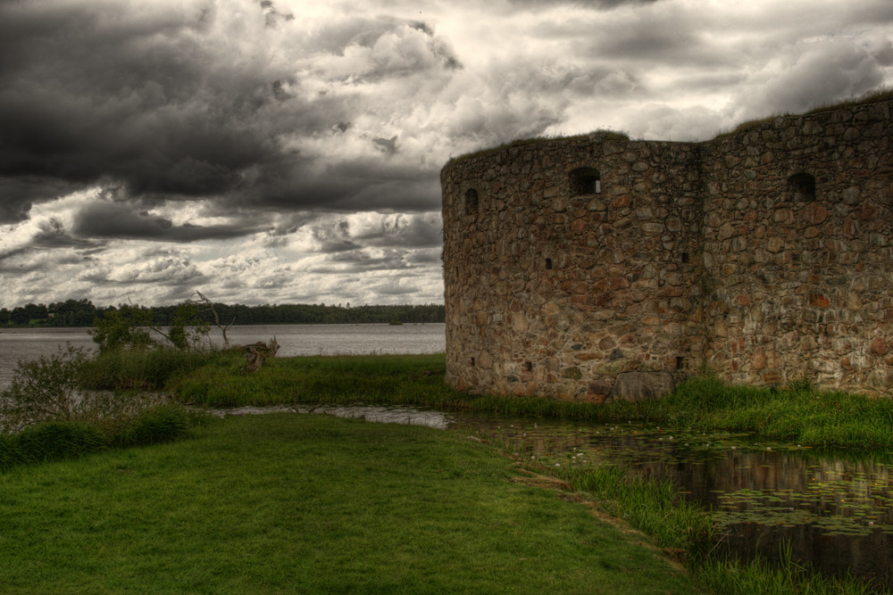 HDR-Aufnahme des Schloss Kronoborg (Kronobergs slottsruin) aus einer 5er Belichtungsserie zusammengesetzt.